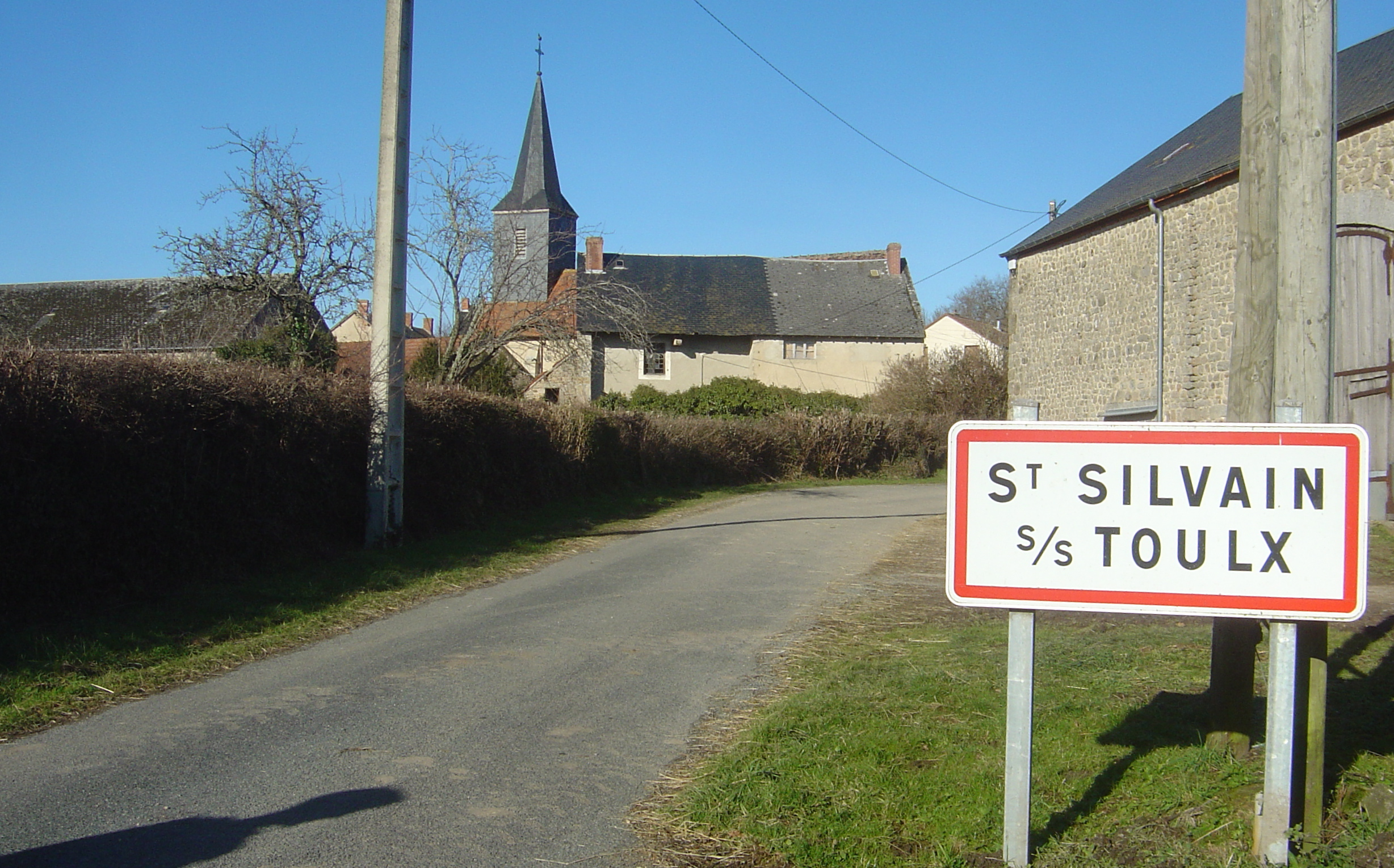 Saint-Silvain-sous-Toulx, Creuse, France